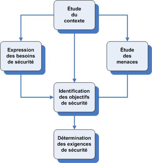 Schéma de la méthode d'analyse de risques EBIOS (Expression des besoins et identification des objectifs de sécurité). Inspiré des schémas des documents PDF accessibles sur